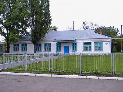 Общежитие 2 Майское